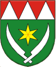 Znak obce Smržice